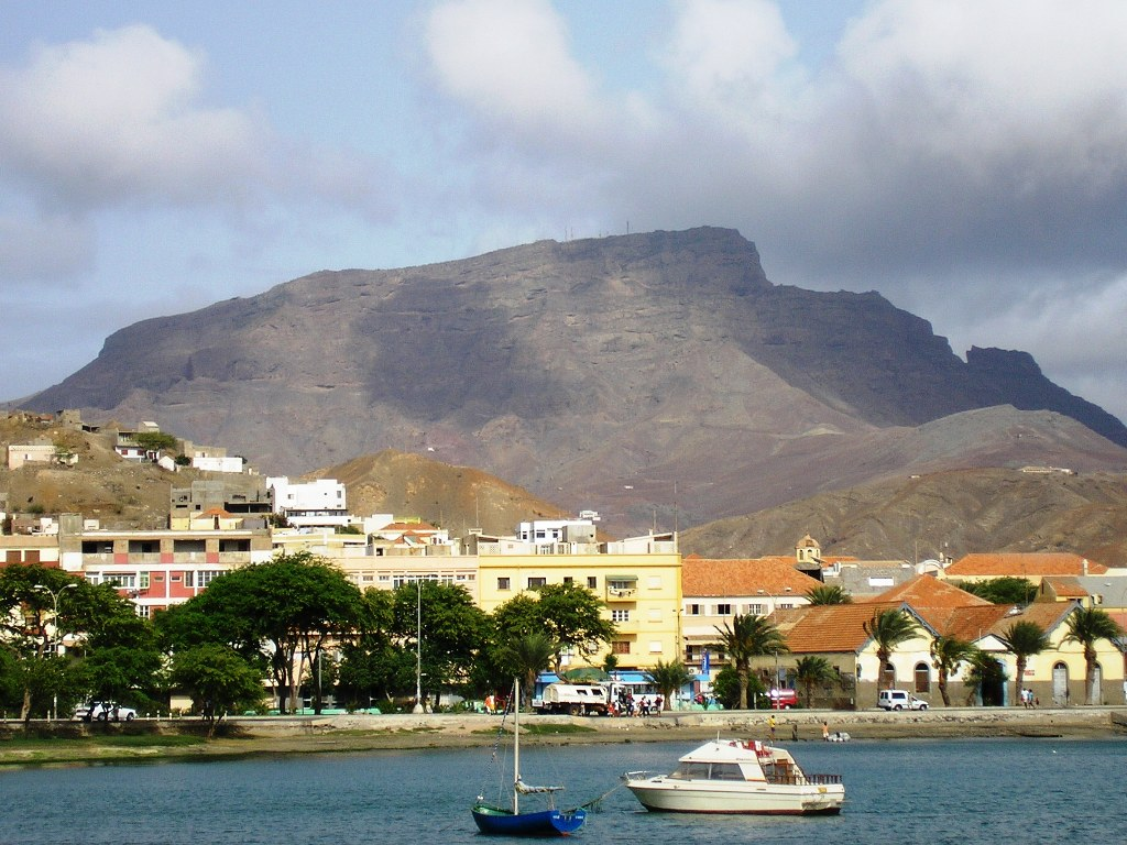 "Monte Verde" as seen from Mindelo town in São Vicente island, Cape Verde